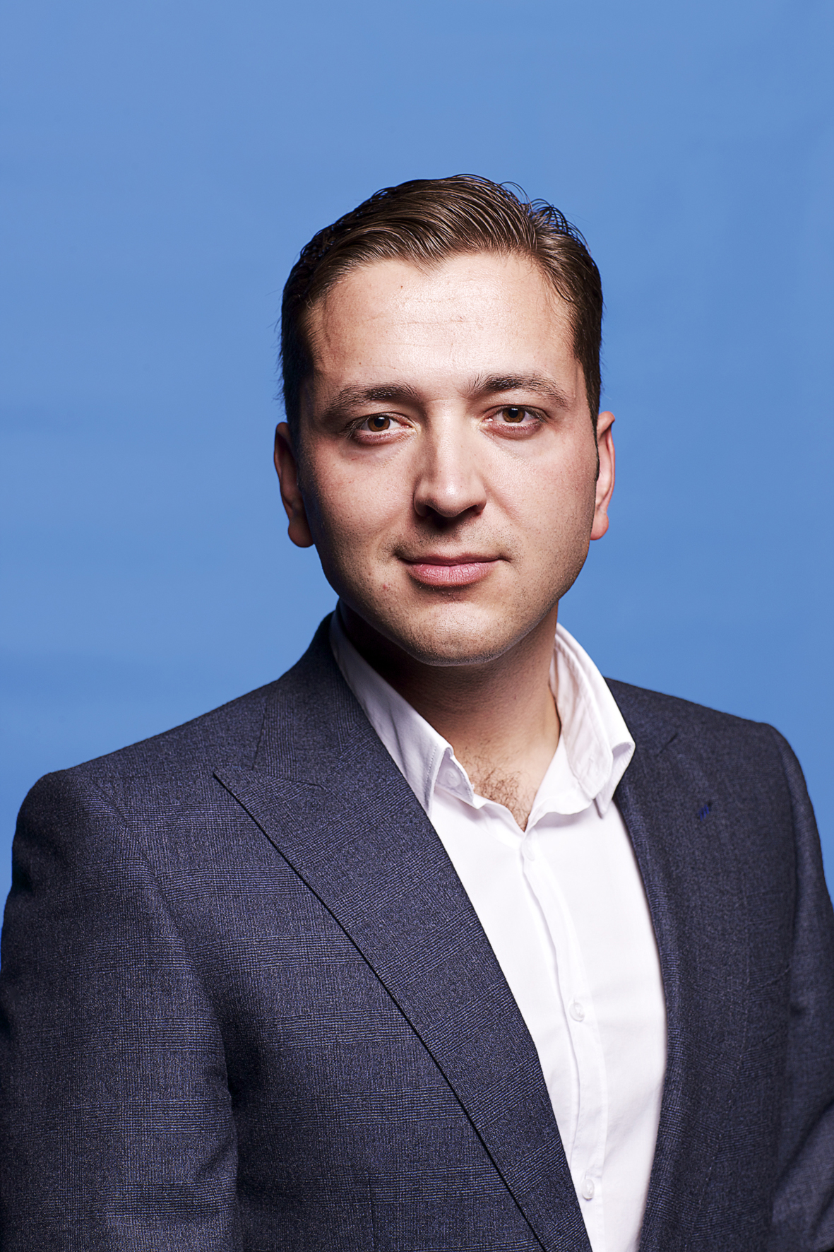 Kandidaat-Kamerlid. Foto: Lex Draijer.